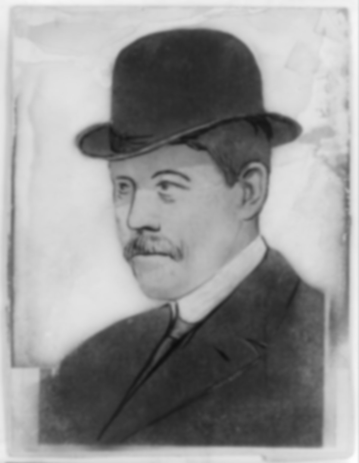 Frederick Gebhard